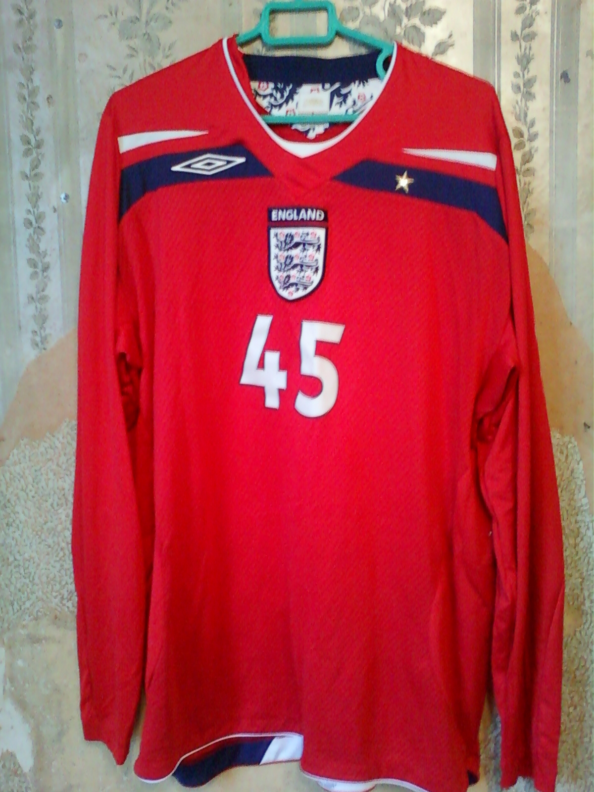 Maillot away de l'équipe d'Angleterre entre 2007 et 2009.